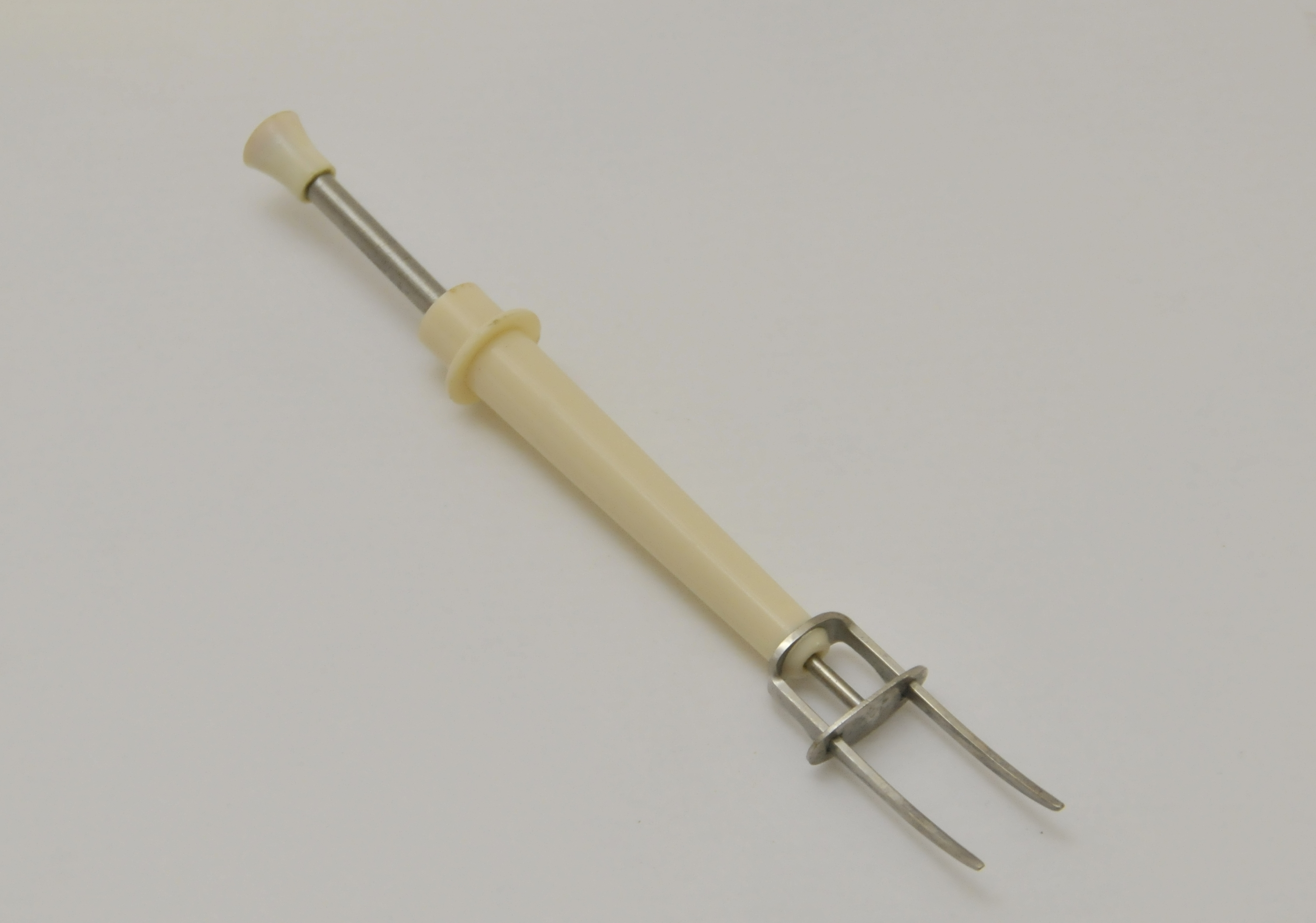 Vorlegegabel mit Abstreifer